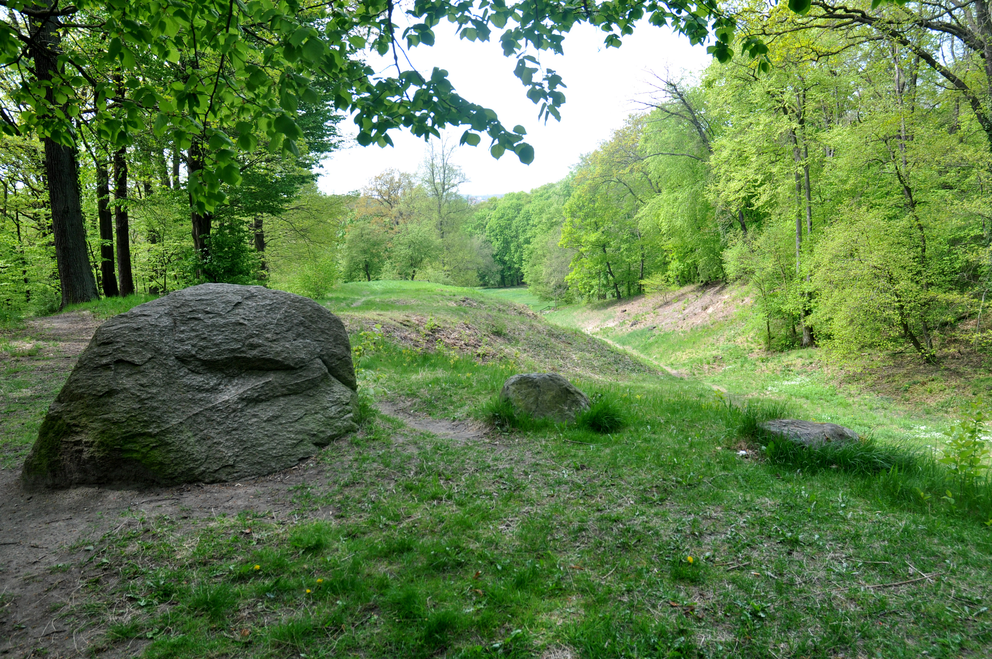 Park Klein-Glienicke, Schlucht im Böttcherberg